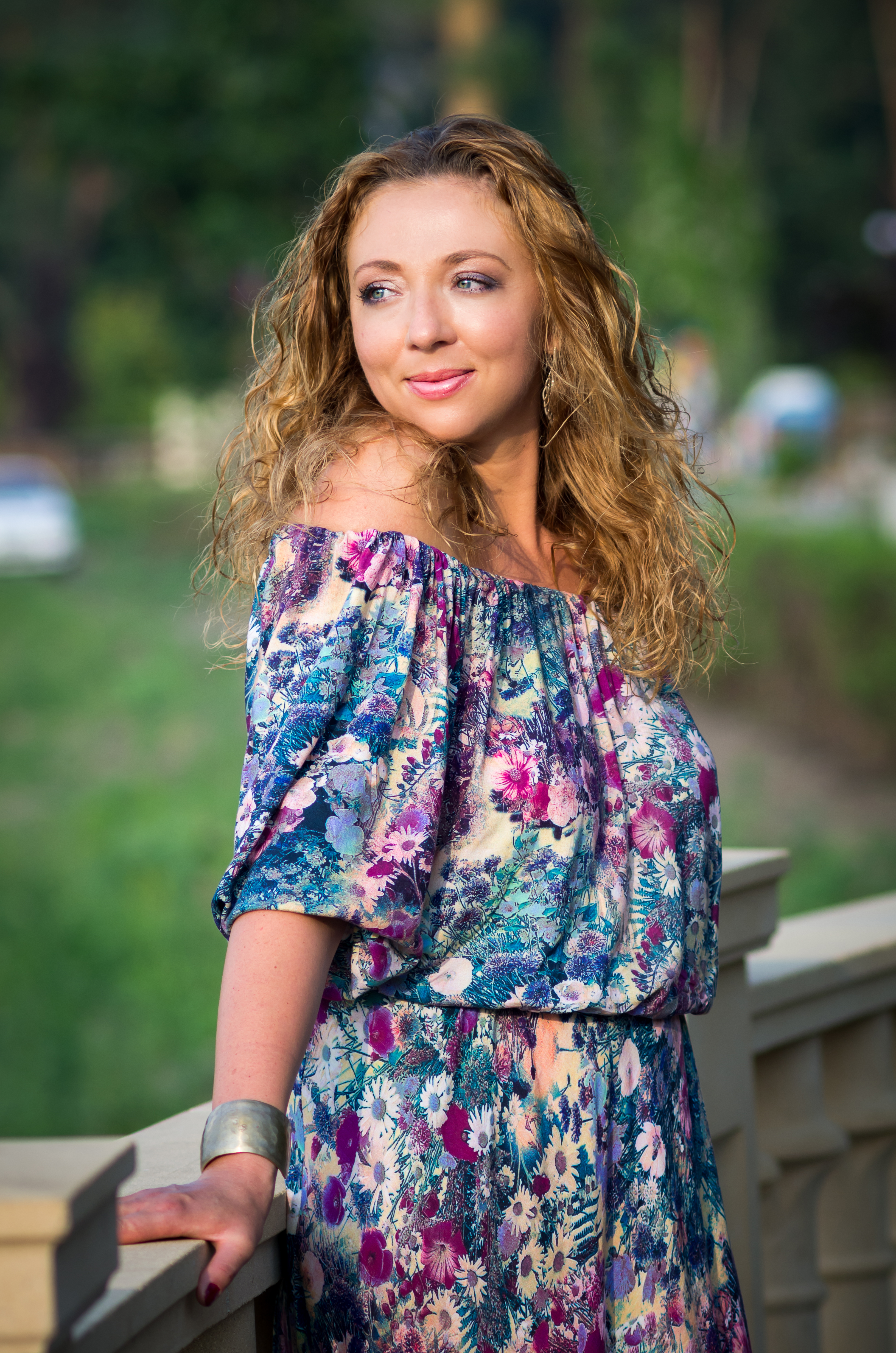 Олена Карпенко